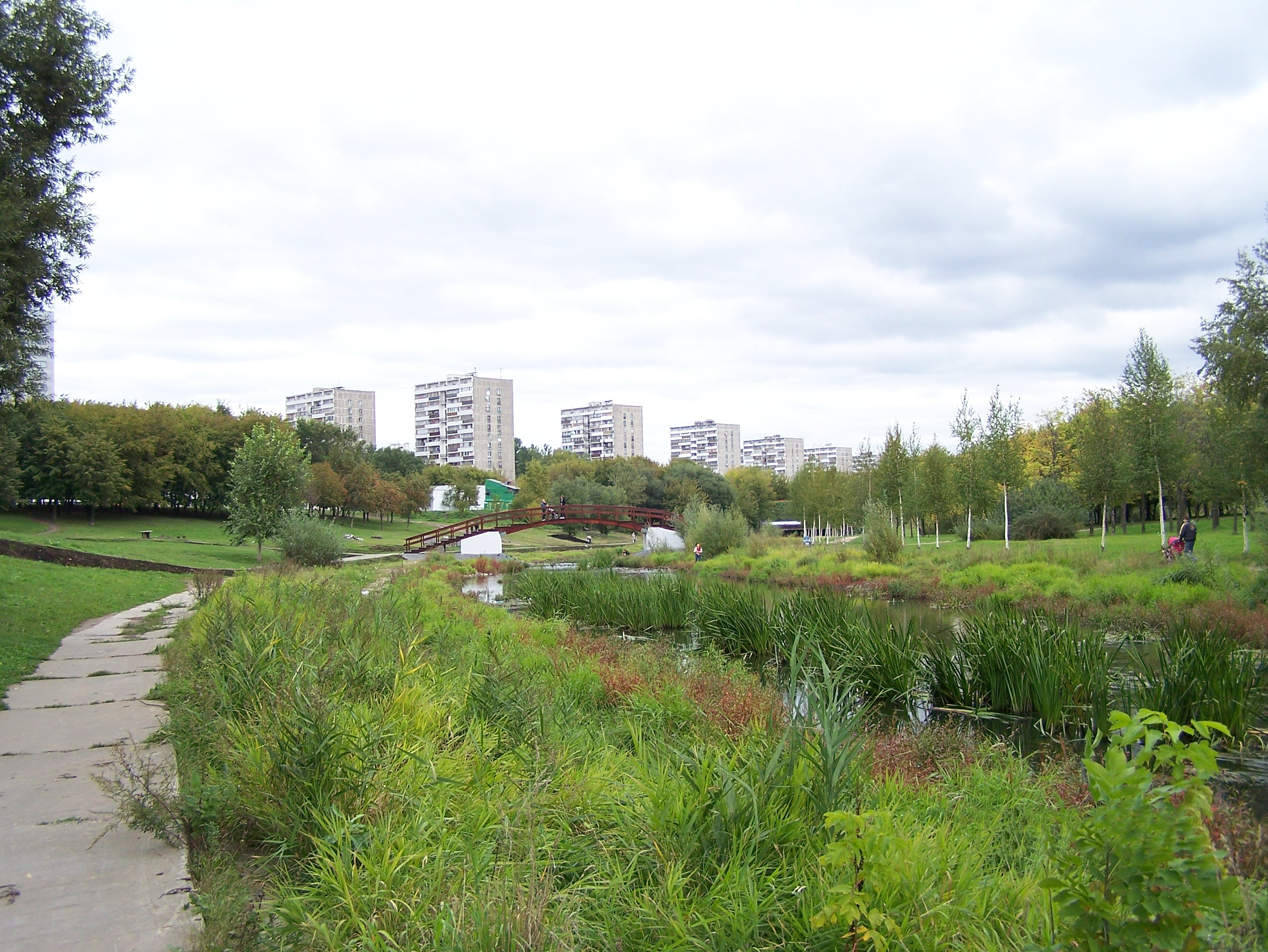 Река Яуза в Москве